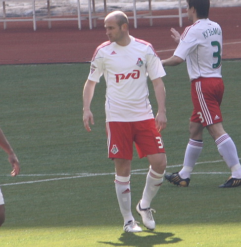 Malhaz Asatiani